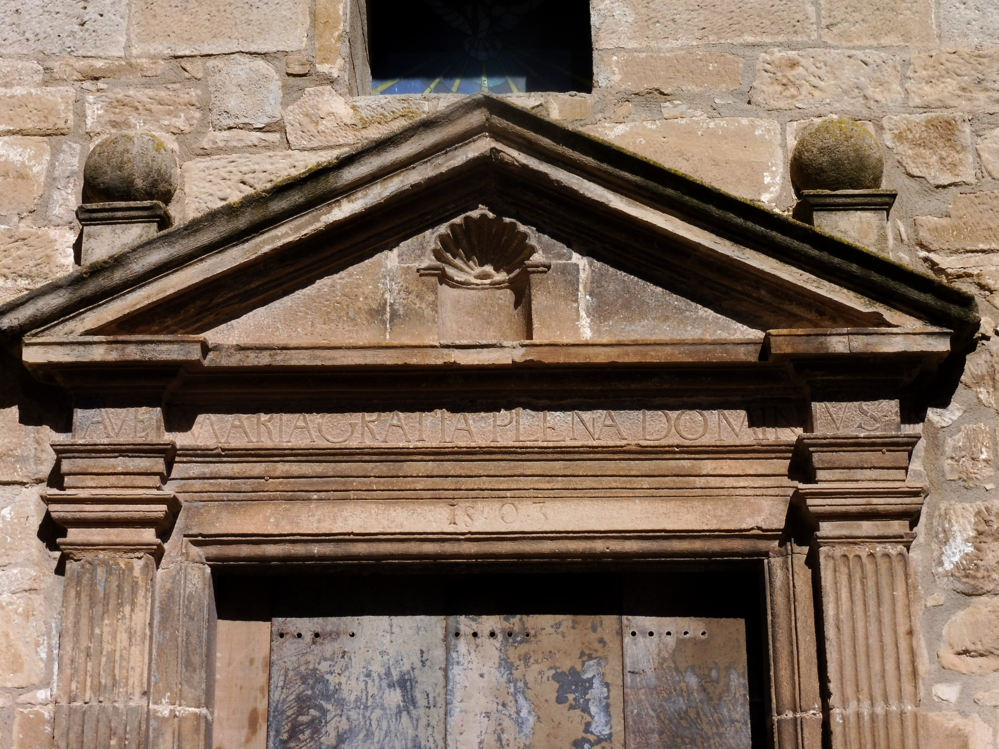 Església de Sant Abdó i Sant Senén de Llorenç de Rocafort (Sant Martí de Riucorb): frontó de la portada